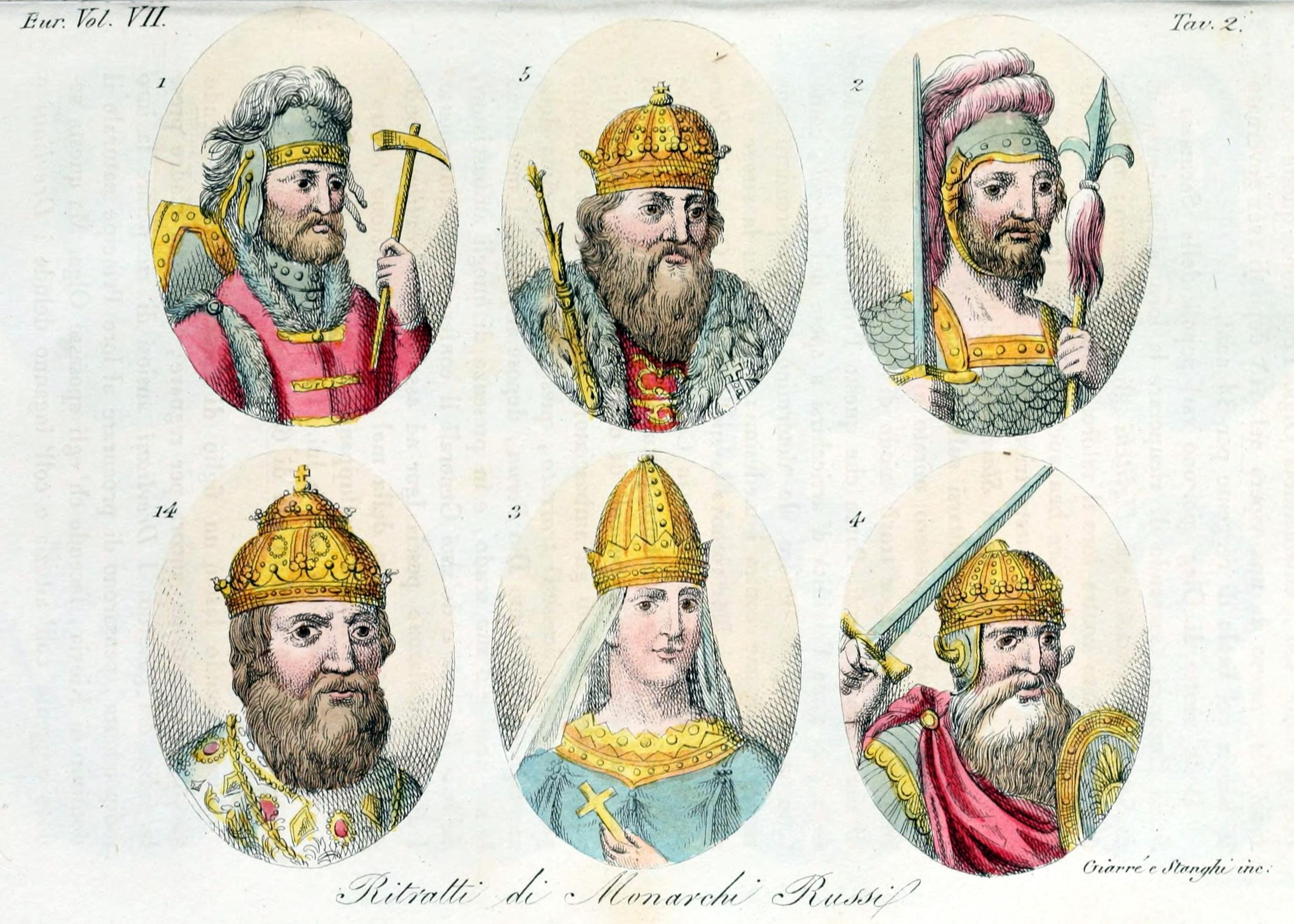 Ritratti di monarchi russi: 1.Rurik 2.Igor 3.Olga 4.Sviatoslaf 5.Volodomiro il Grande 14.Ivan IV il Conquistatore